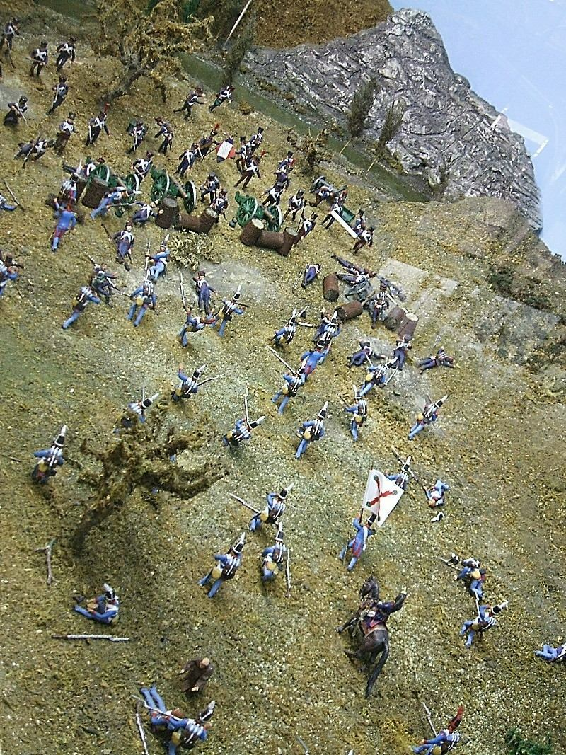 Museo de Armería de Álava, Vitoria-Gasteiz, País Vasco, España. La maqueta representa el comienzo de la Batalla de Vitoria, el 21 de junio de 1813, con el ataque del general Morillo a las fuerzas francesas en el paso de la Conchas de la Puebla de Arganzón, a orillas del río Zadorra.